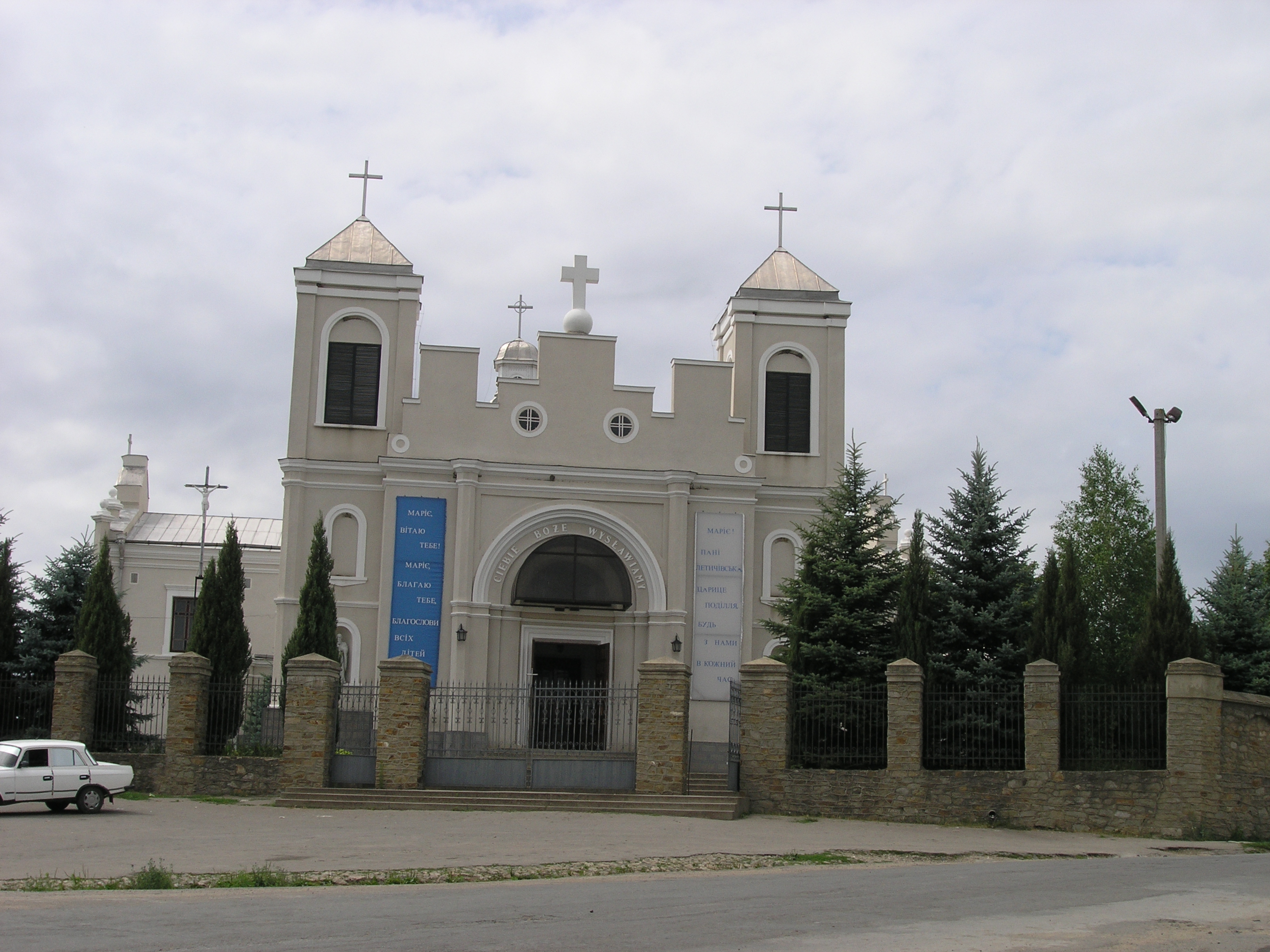 Костьол Св.Миколая, Чернівці, вул. Леніна, 202